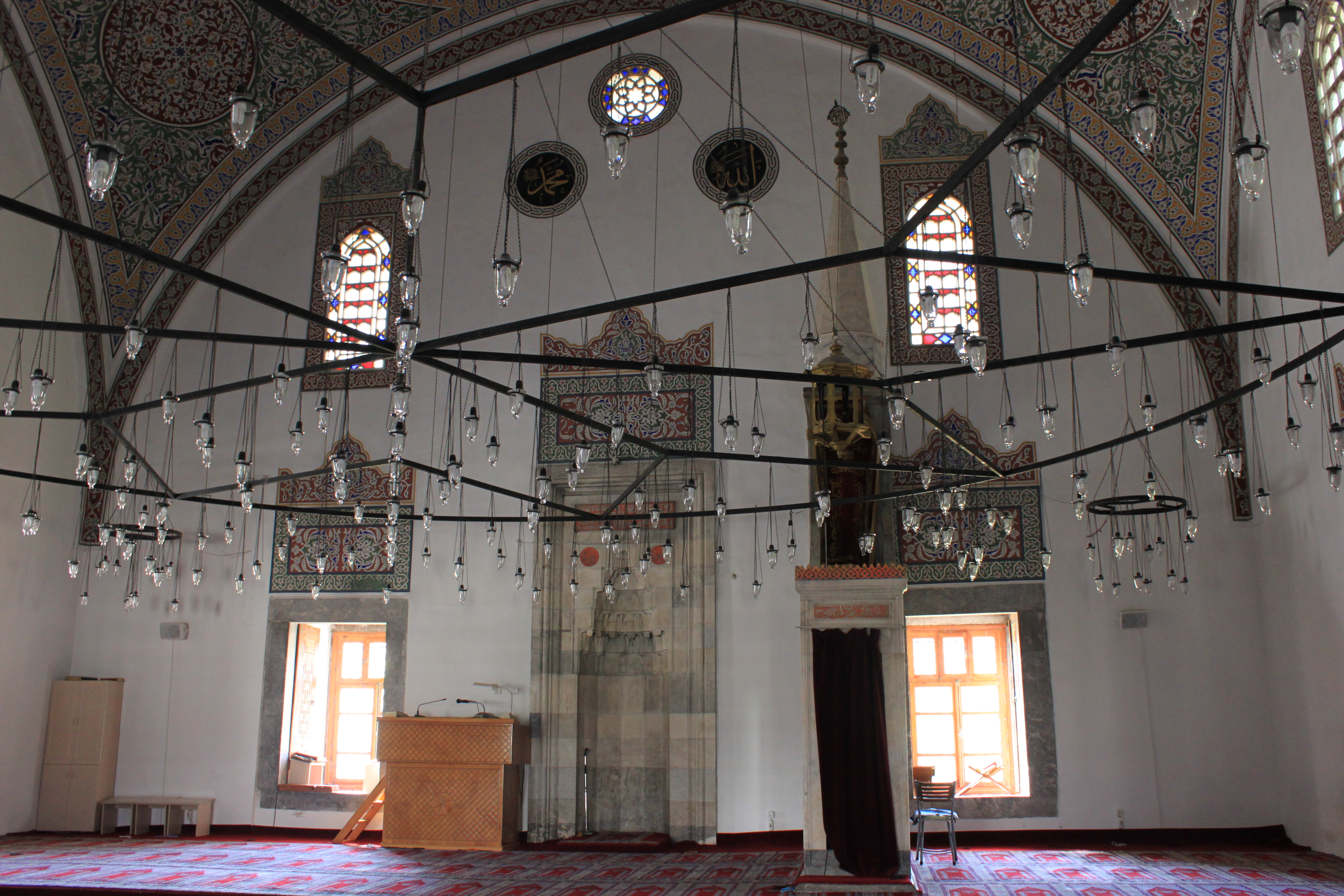 Karapınar; die Sultan Selim Mosche, erbaut 1563 vom Architekten Sinan.